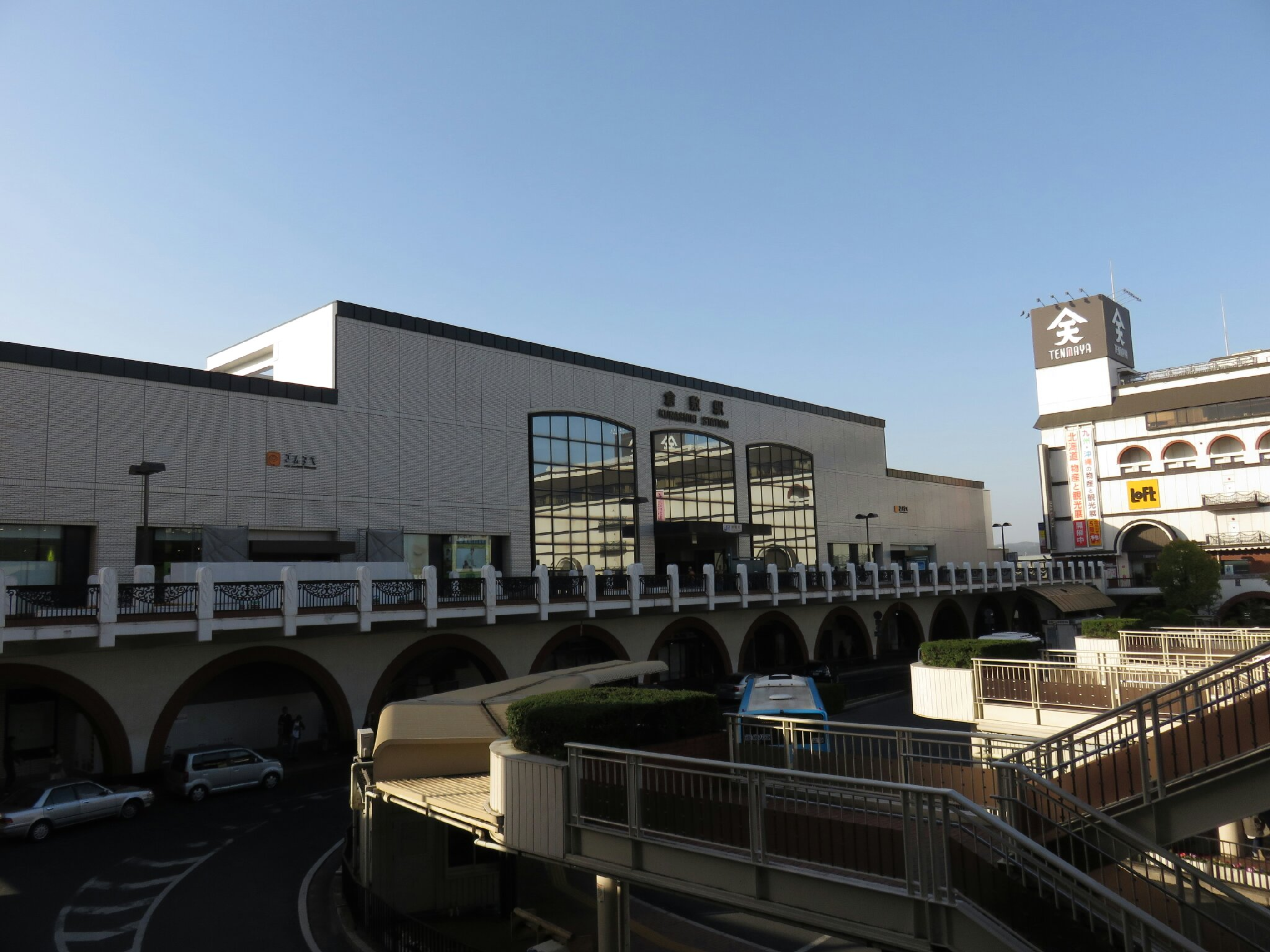 JR倉敷駅の南口外観。